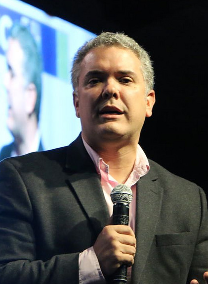 Iván Duque Márquez, candidato presidencial del Centro Democrático.